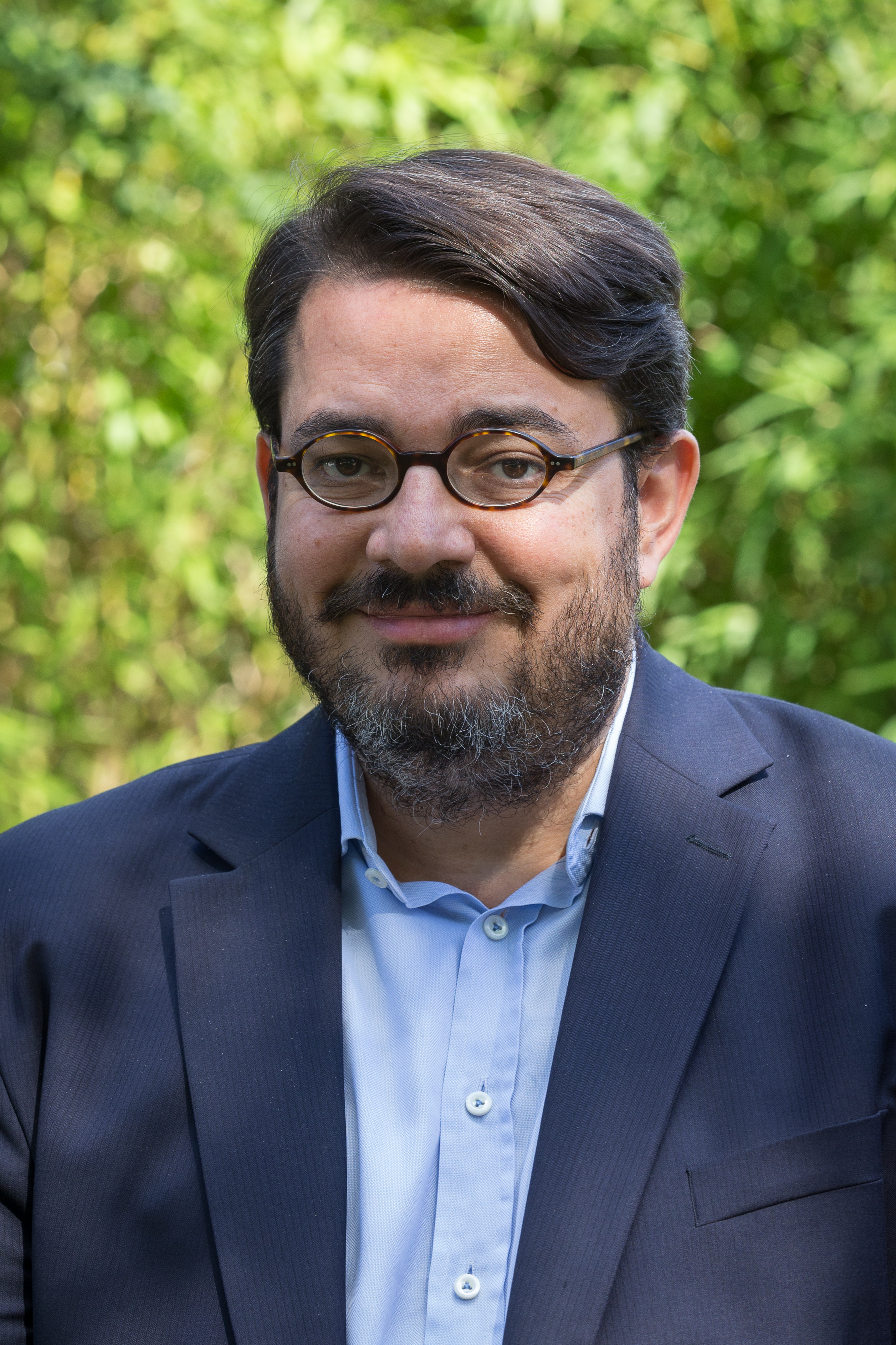 Bruno Fuligni lors du Festival international de géographie 2015.